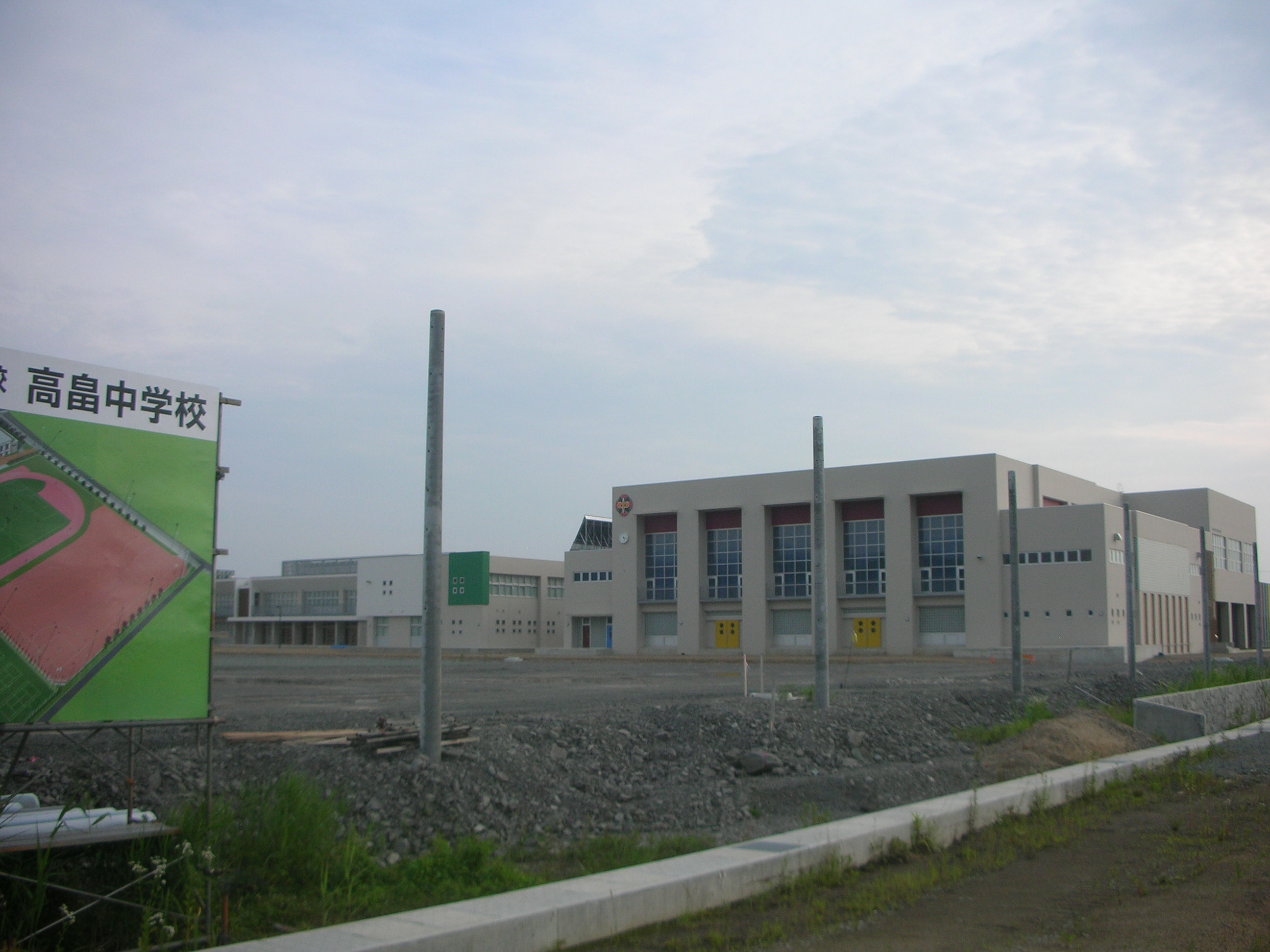 高畠町の計画